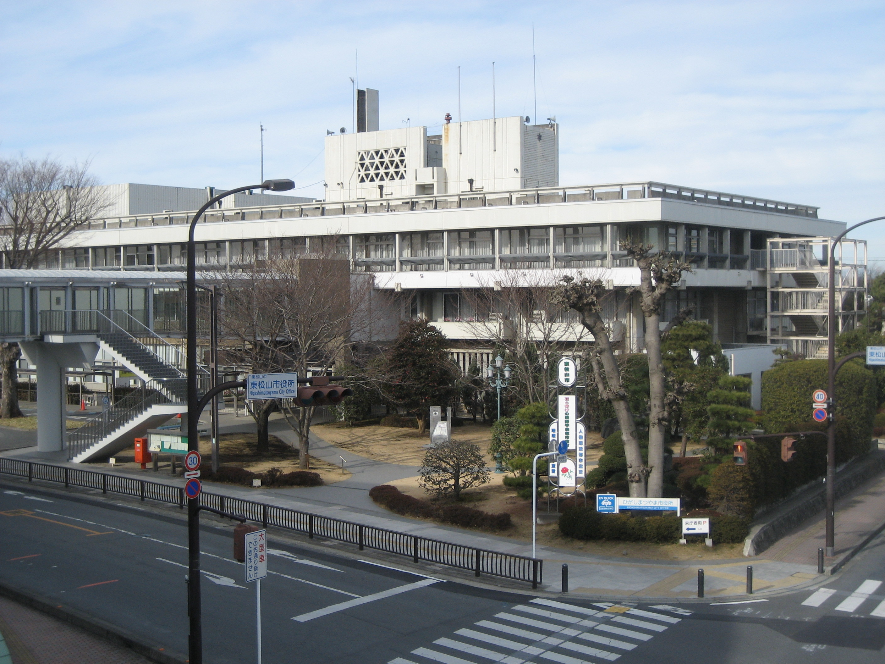 東松山市役所庁舎